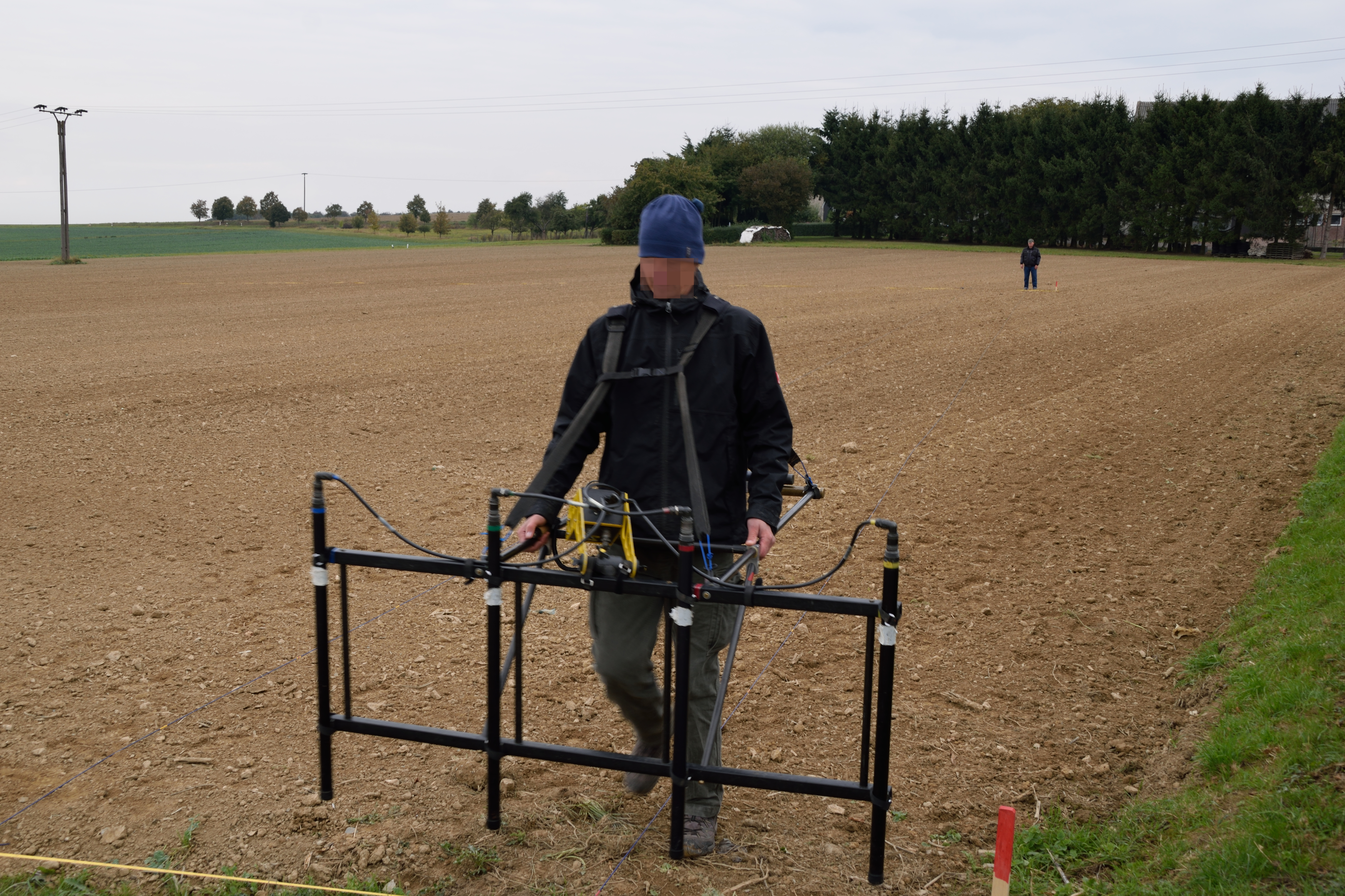 Fluxgatemagnetometer im Feldeinsatz zur geomagnetischen Prospektion zwecks Detektion von archäologischen Befunden